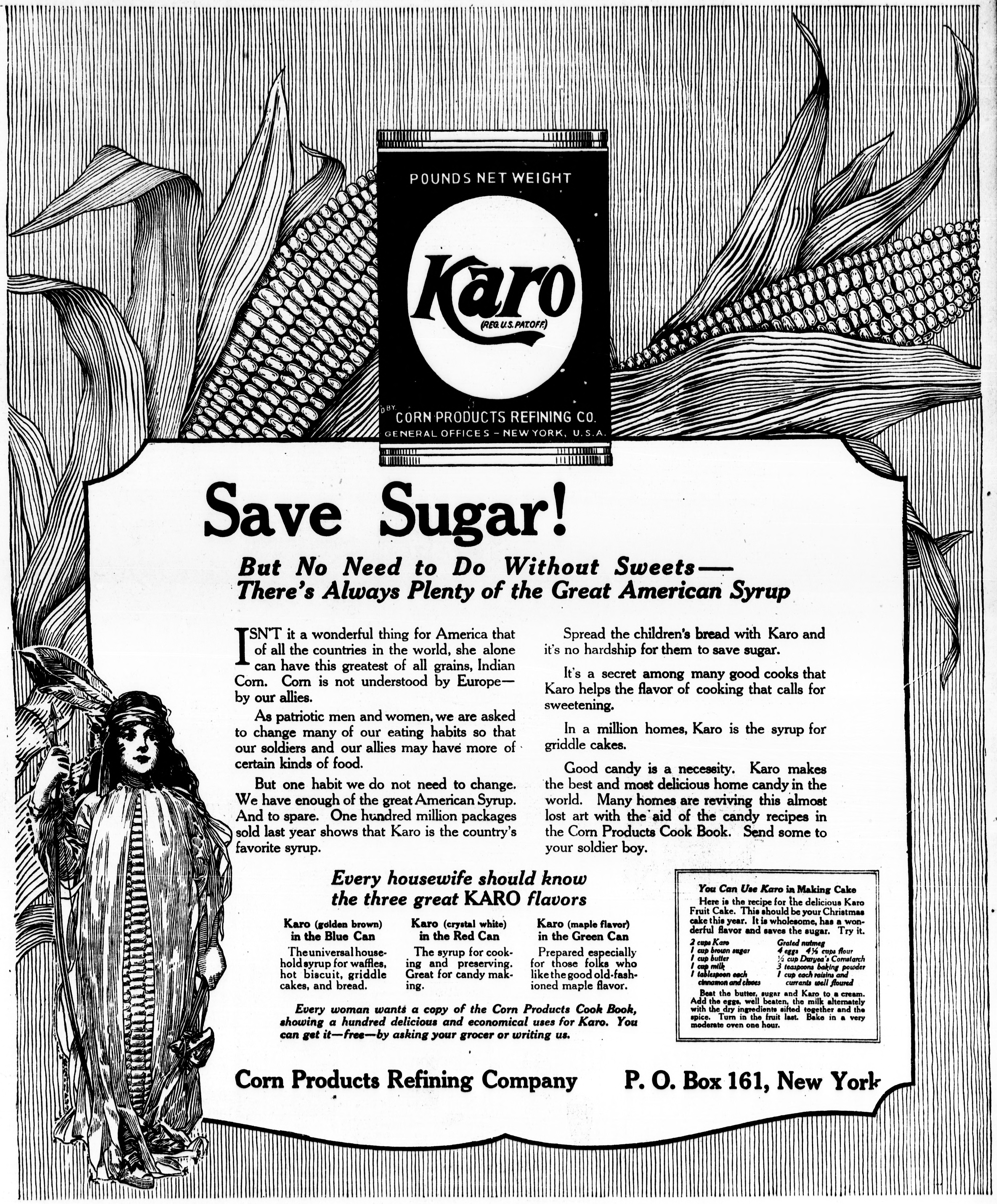 Full page Karo advert, 1917